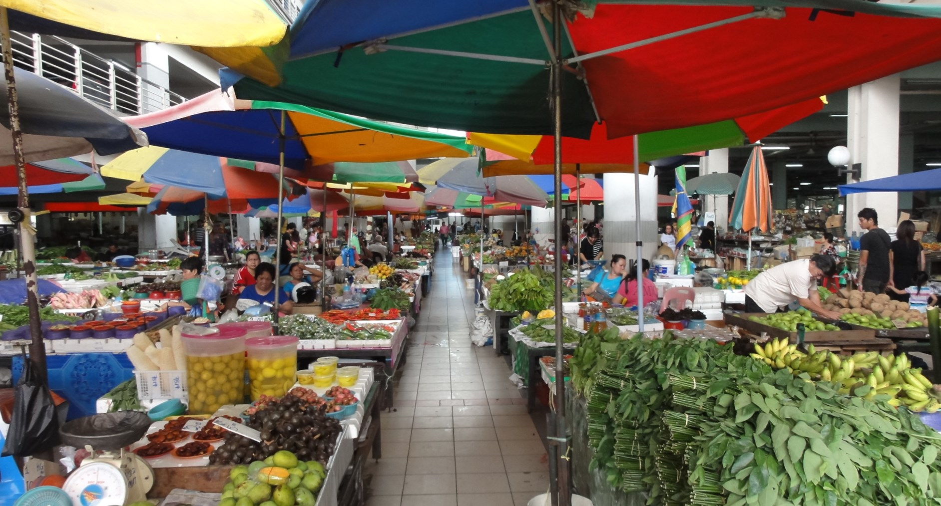 Sibu Market